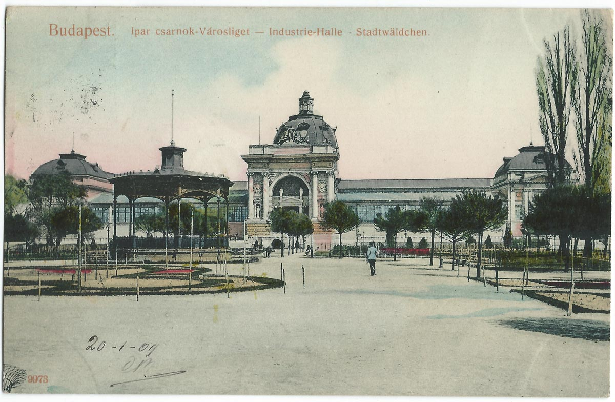 Vue de Budapest au début du XXe siècle.